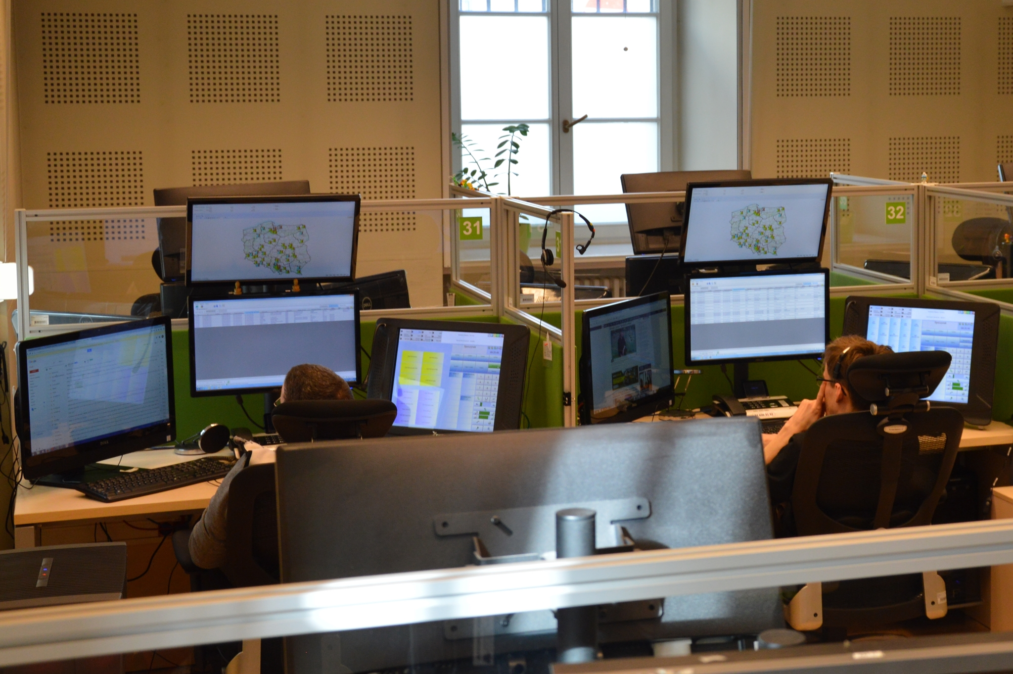 Centrum Powiadamiania Ratunkowego w Katowicach